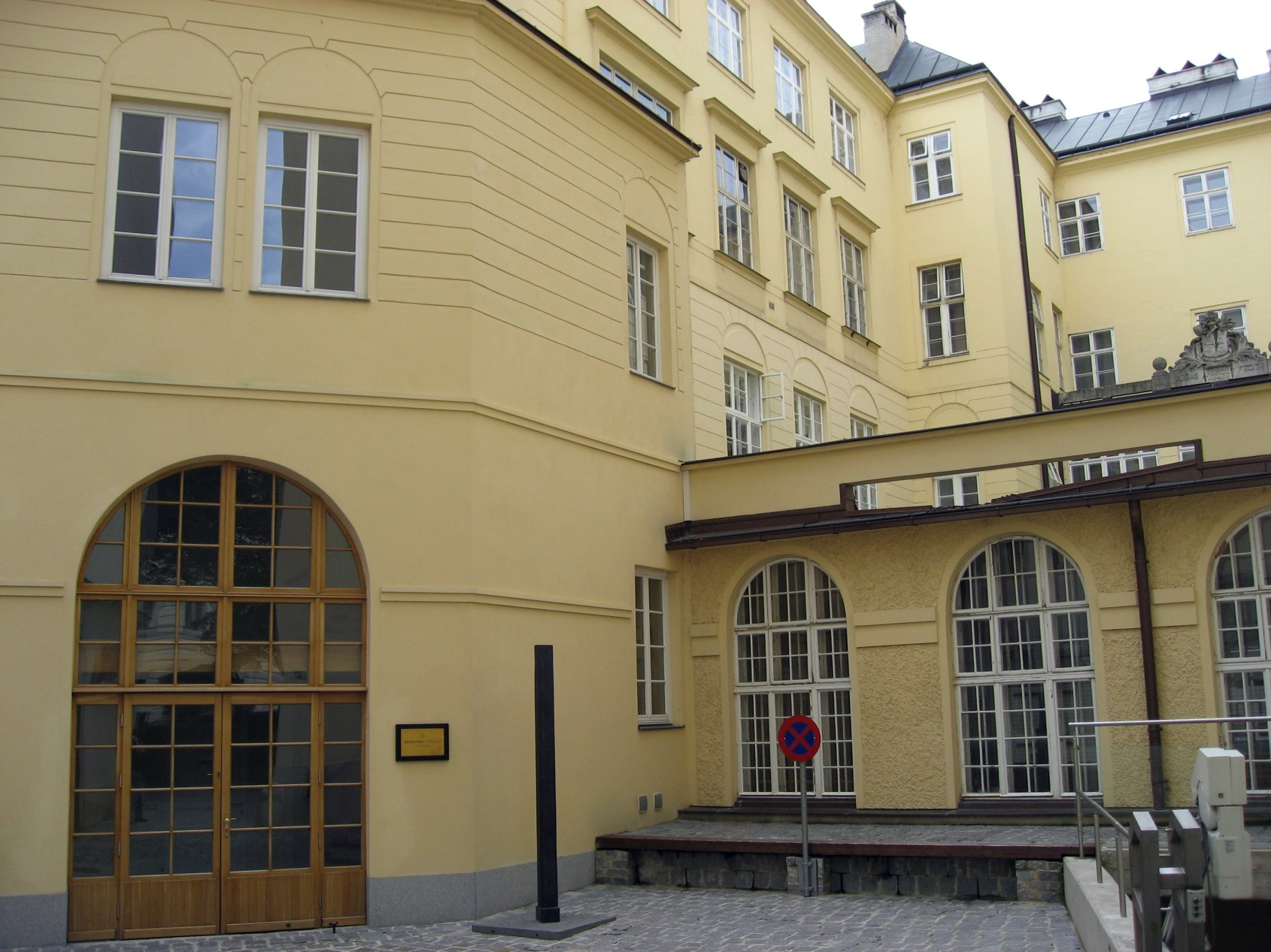 Wien Schottengymnasium